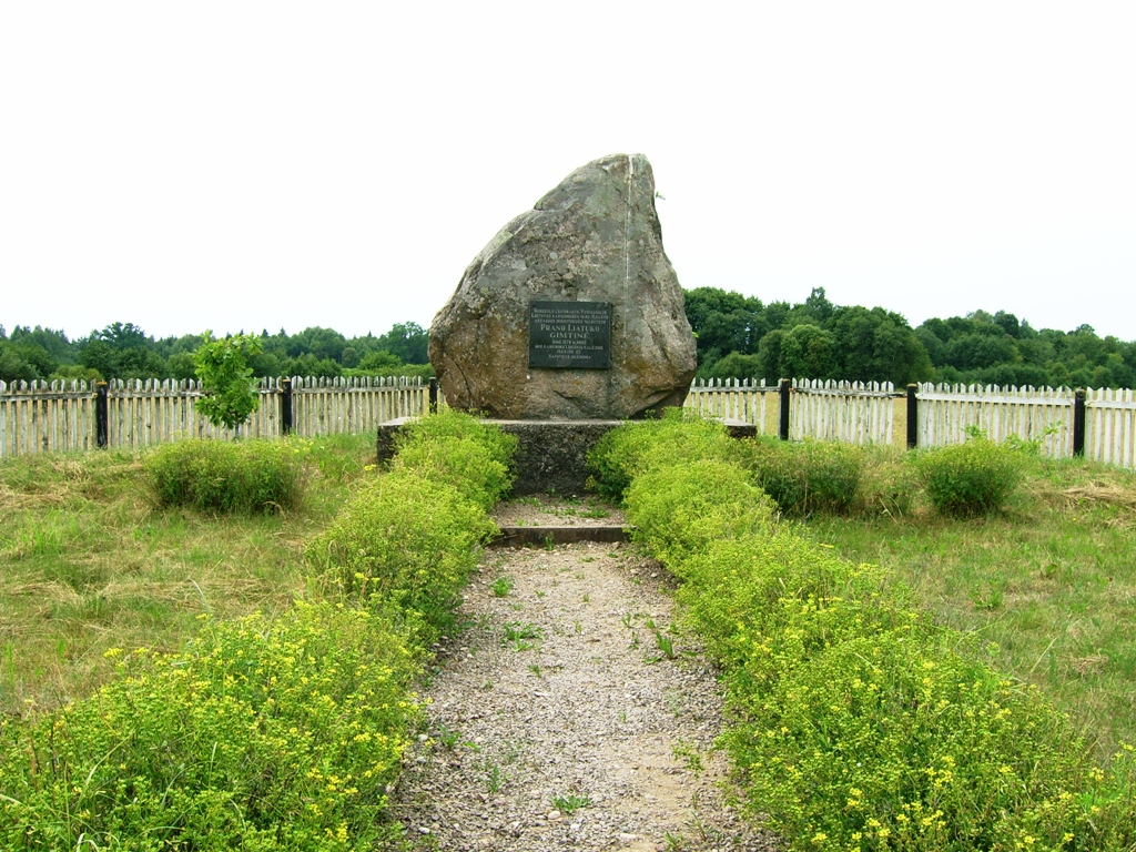 Padievaitis. Paminklinis akmuo generolui leitenantui P. Liatukui